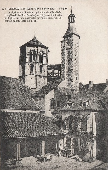 Saint-Gengoux-le-National (département de Saône-et-Loire), l'église ; carte postale ancienne